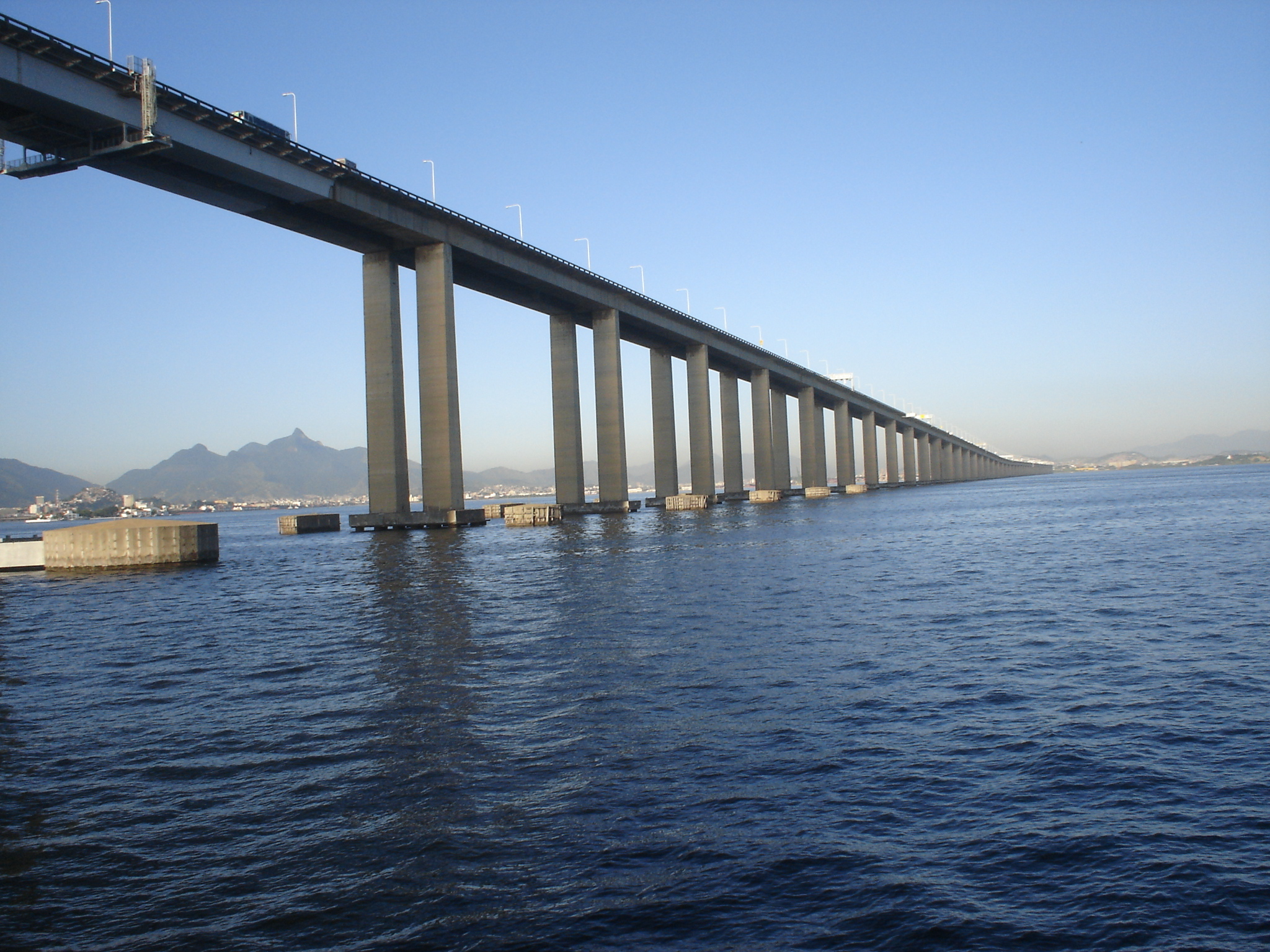 Ponte Rio niteroi